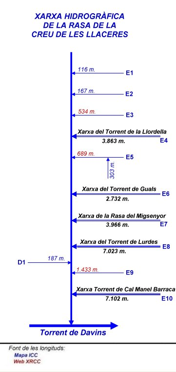 Mapa esquemàtic de la xarxa hidrogràfica de la Rasa de la Creu de les Llaceres, al Bages.